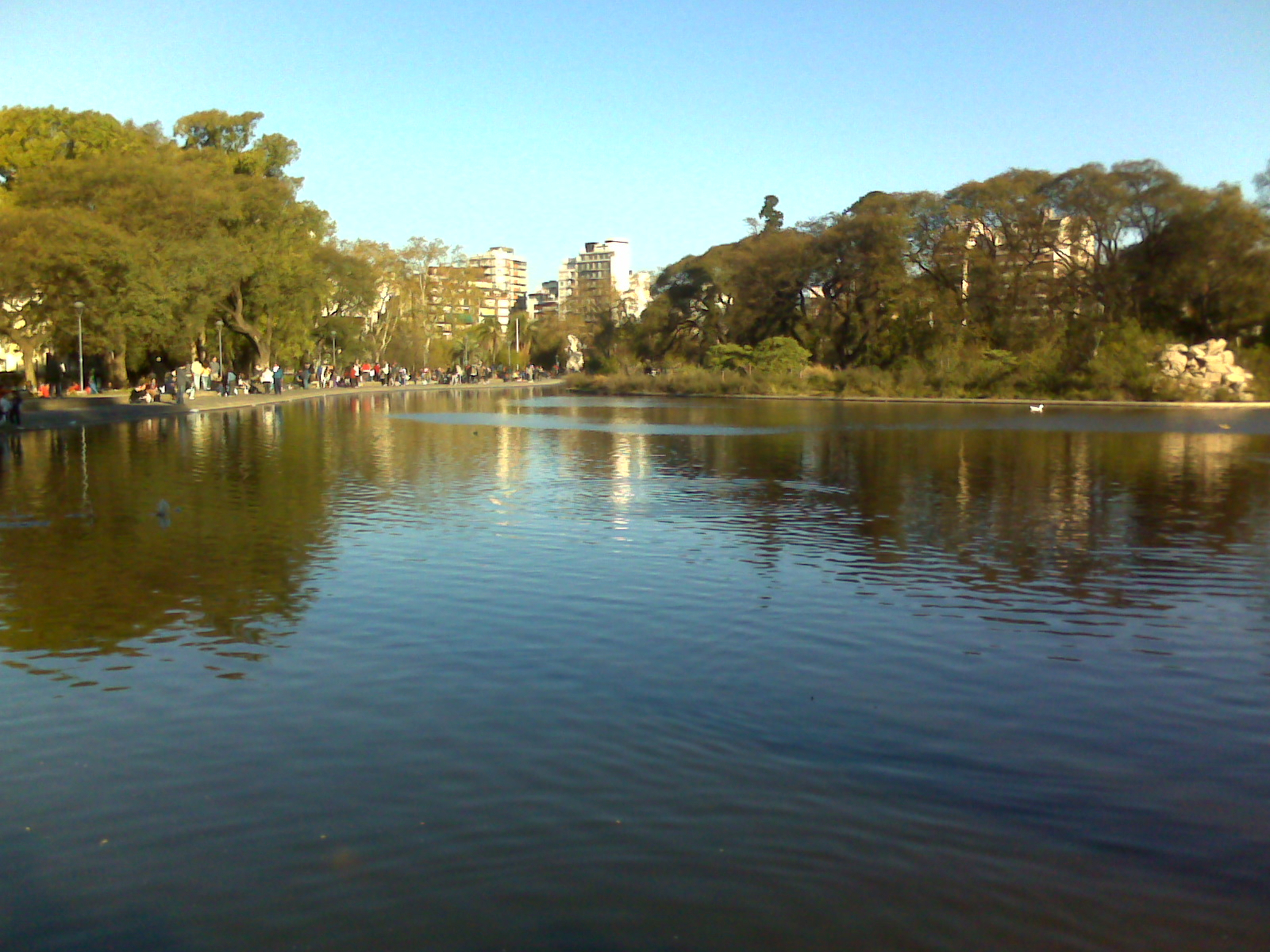 Lake at Parque Centenario, Buenos Aires.